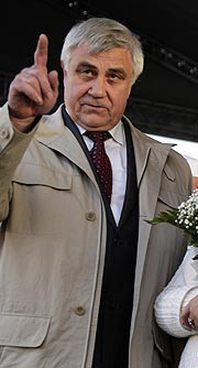 Николай Владимирович Виноградов